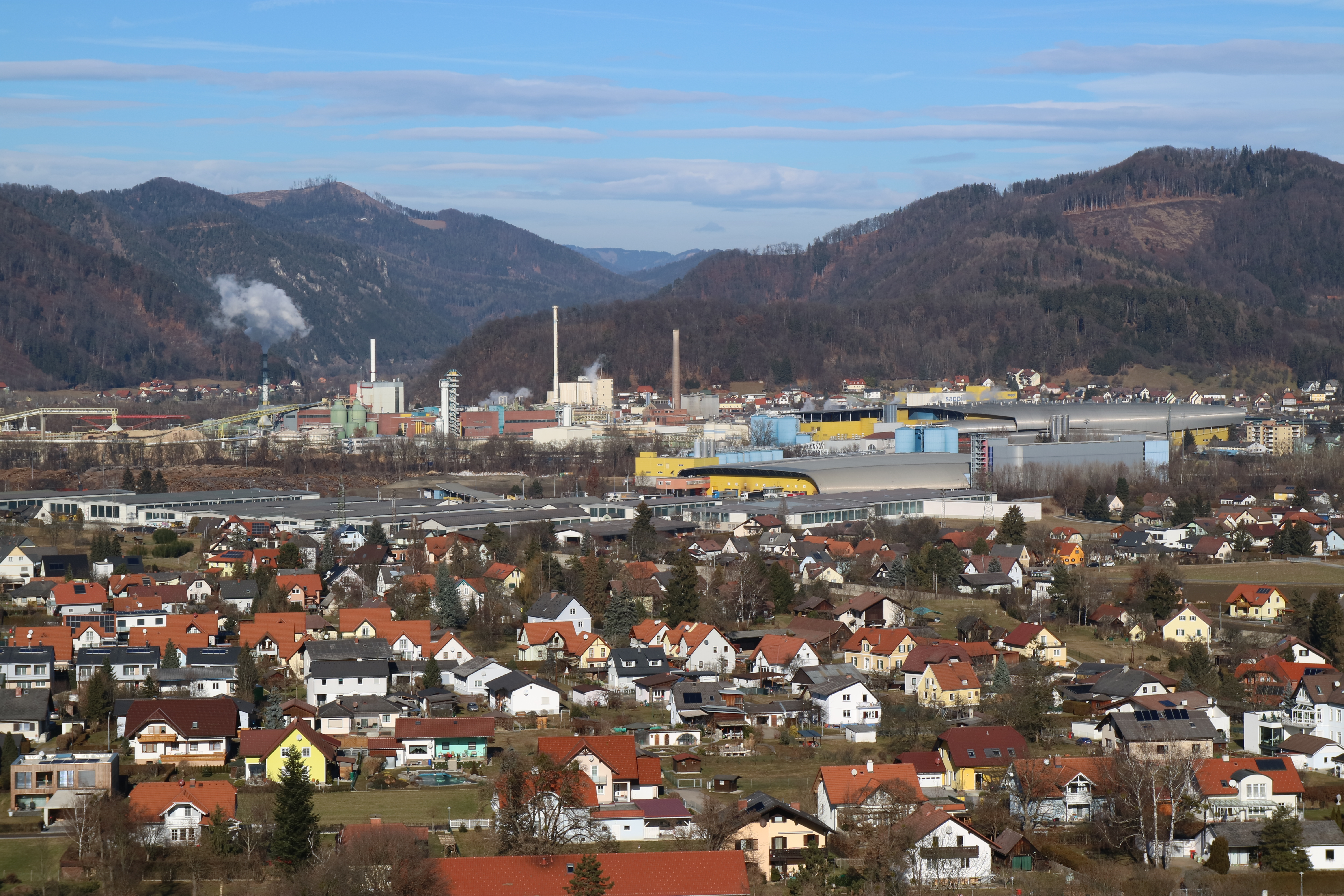 Blick von Maria Straßengel zur Sappi-Papierfabrik Gratkorn